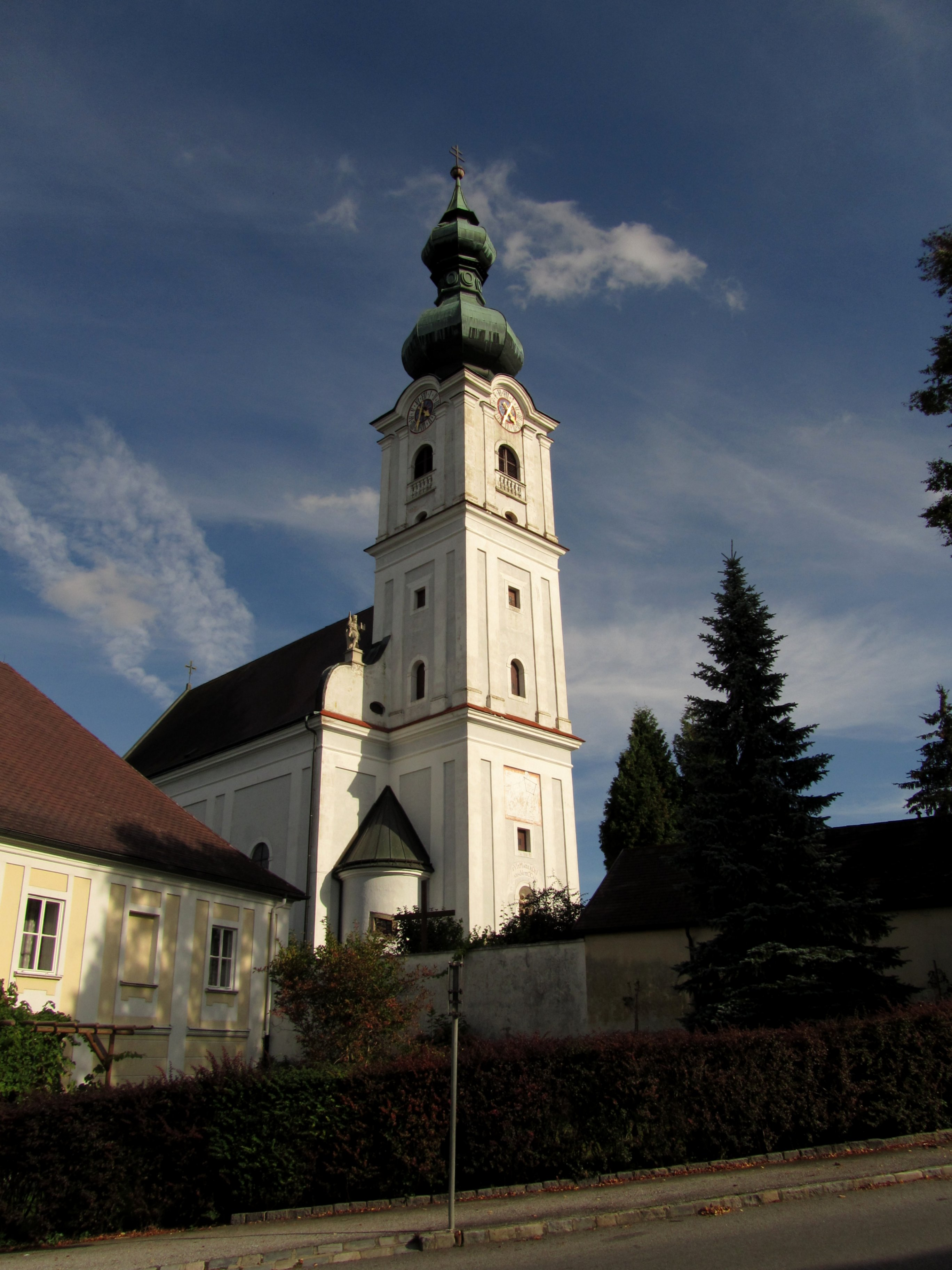 Kath. Pfarrkirche hl. Johannes der Täufer und ehem. Friedhof